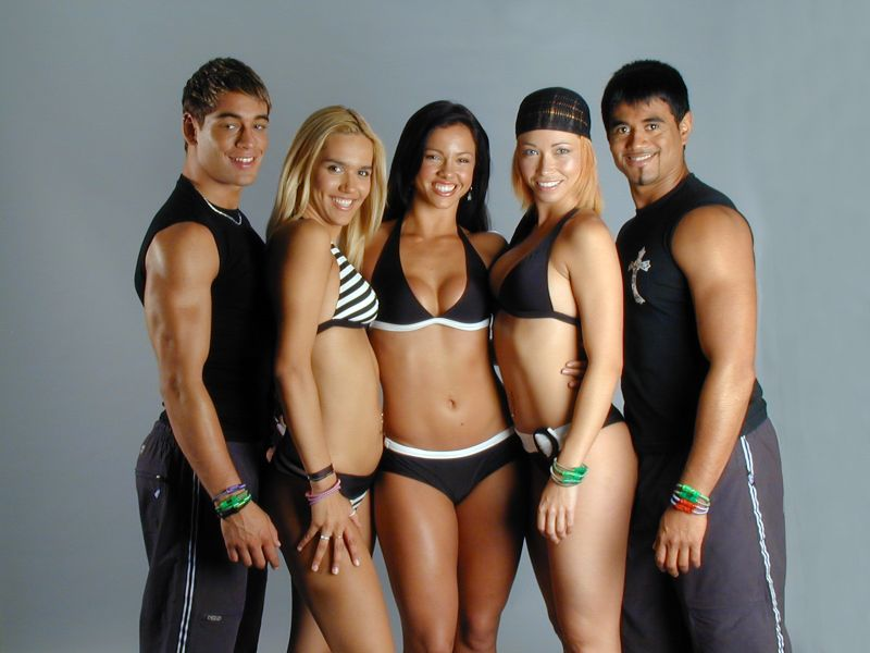 Porto Seguro, grupo de axé popular en Chile durante la década de 2000.